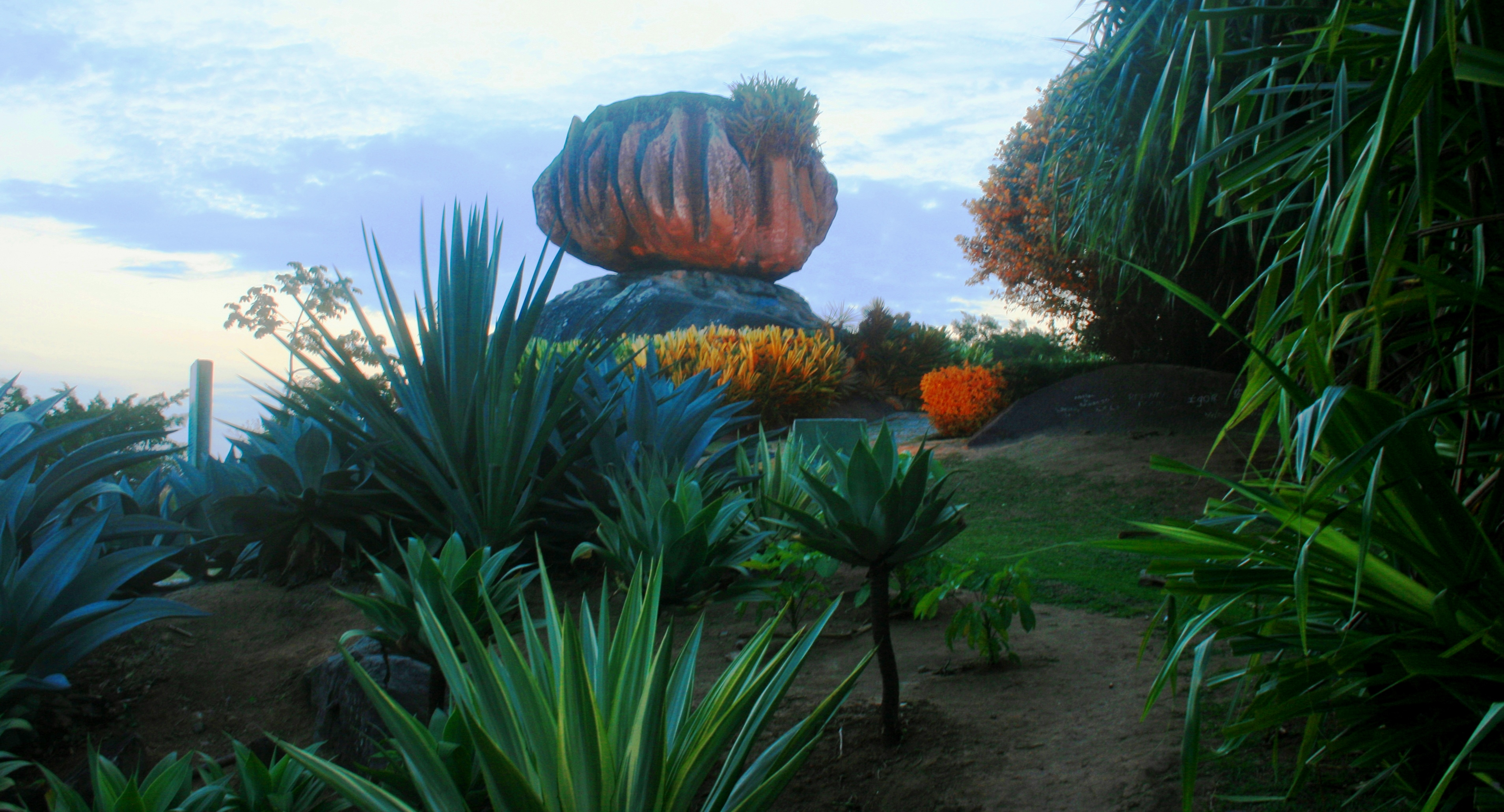 Parque da Pedra da Cebola - Vitória-ES Brasil